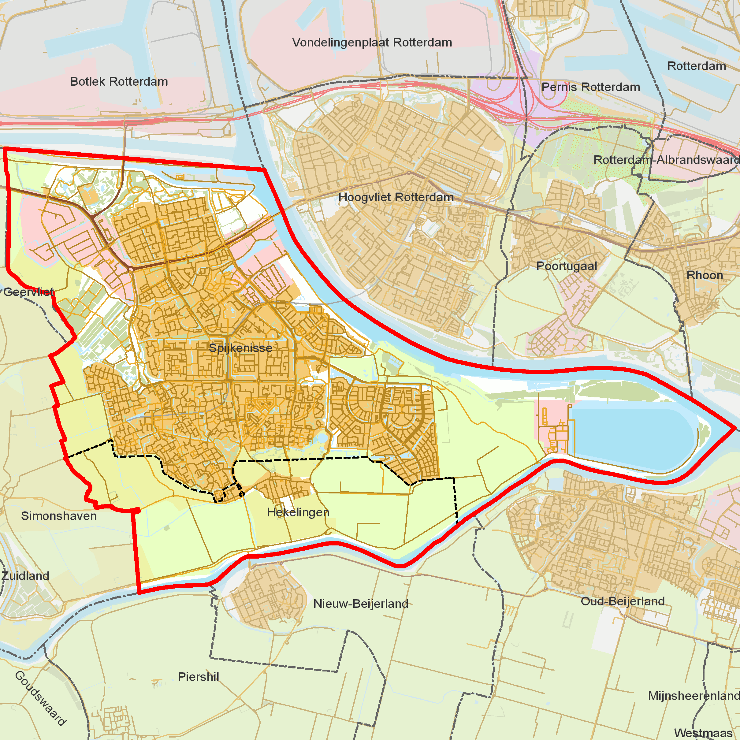 BAG woonplaatsen - Gemeente Spijkenisse.png